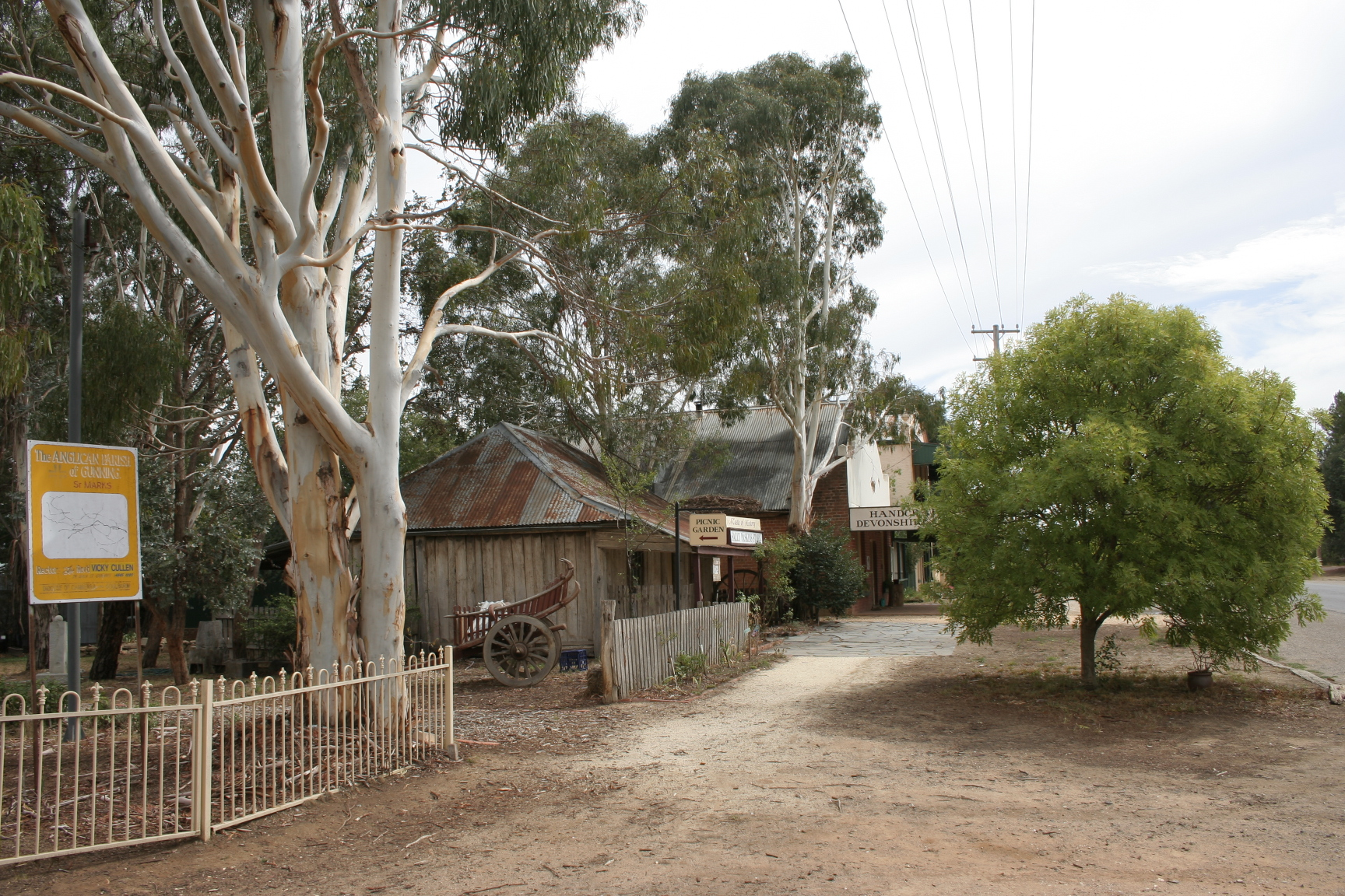 Gundaroo